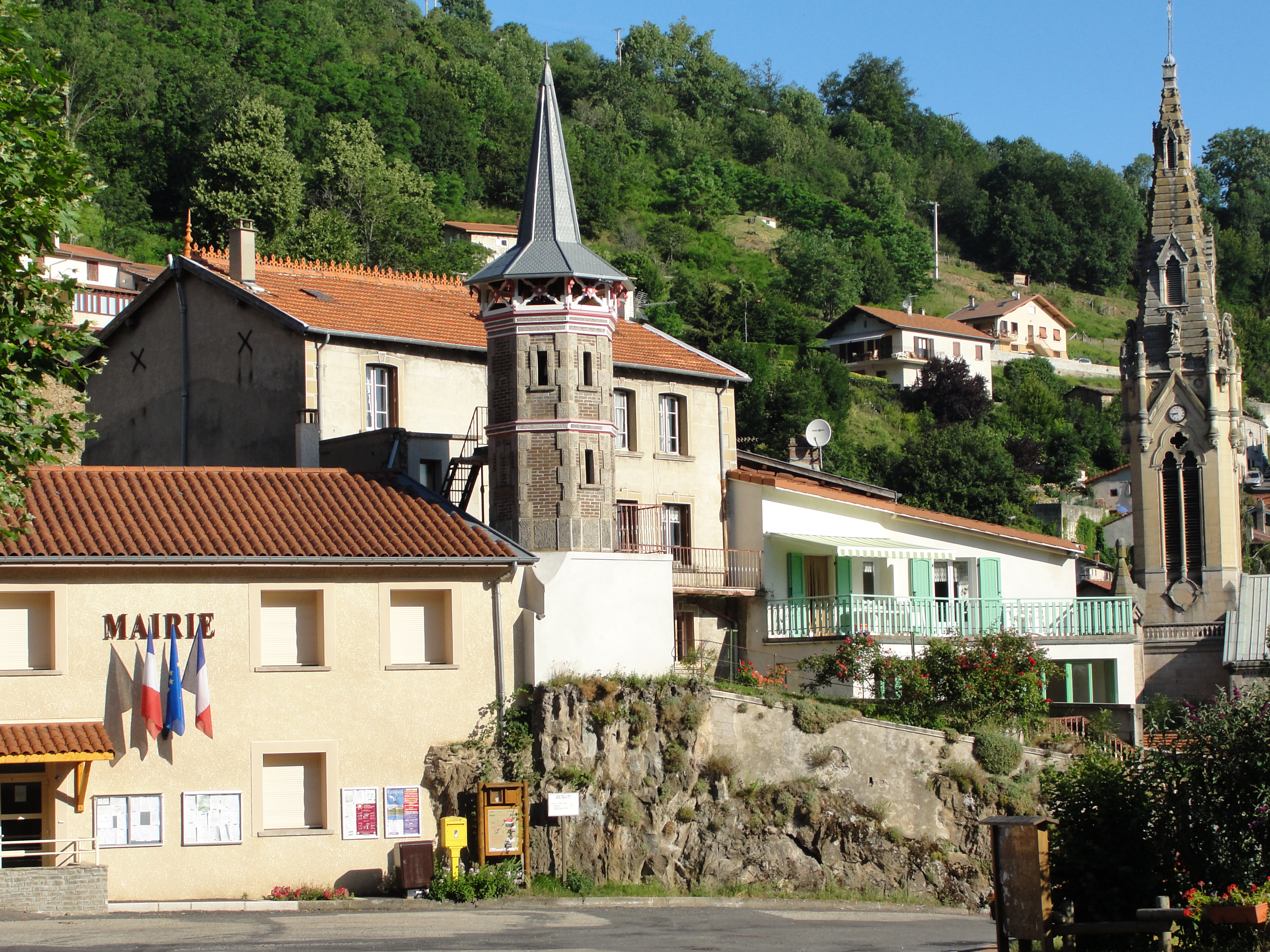 Place de Valfleury, Loire.